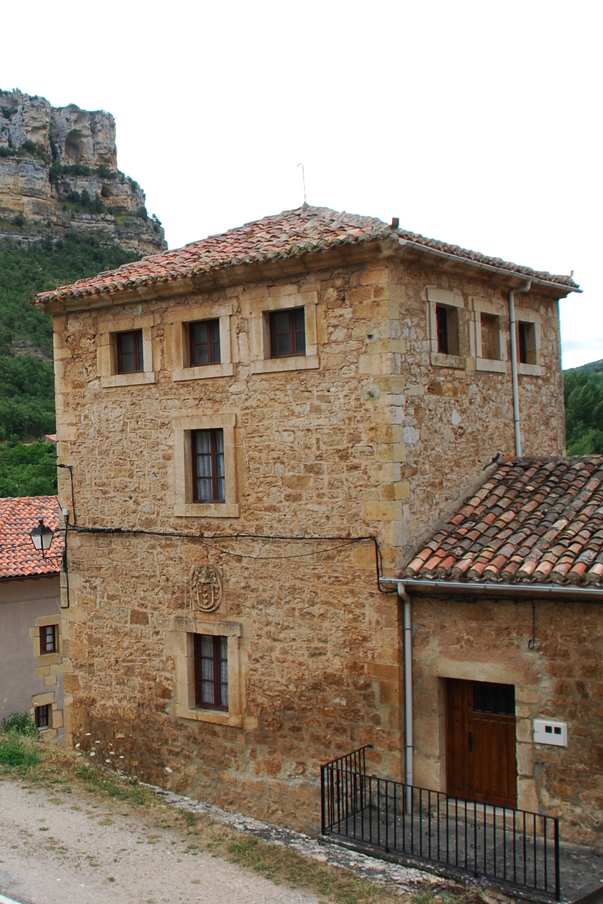 Palacio de los Gallo en Escalada, Burgos - España.